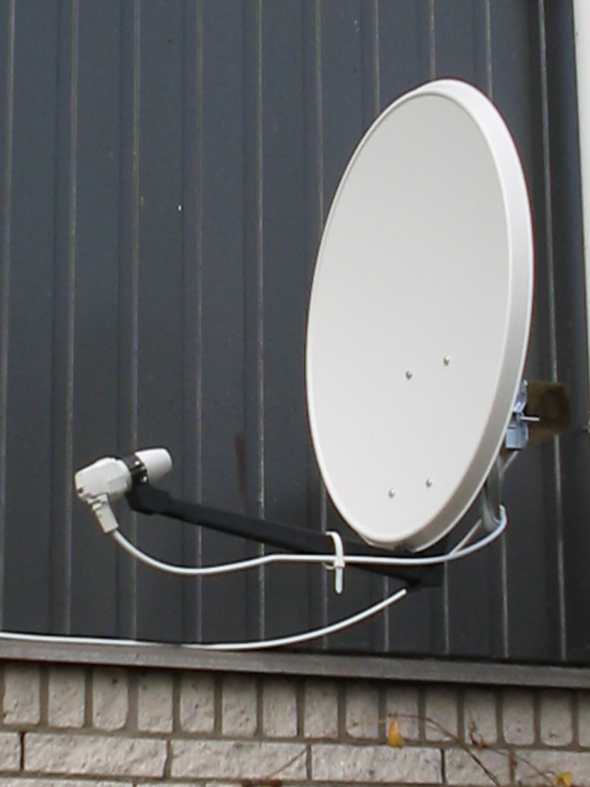 satellite dish